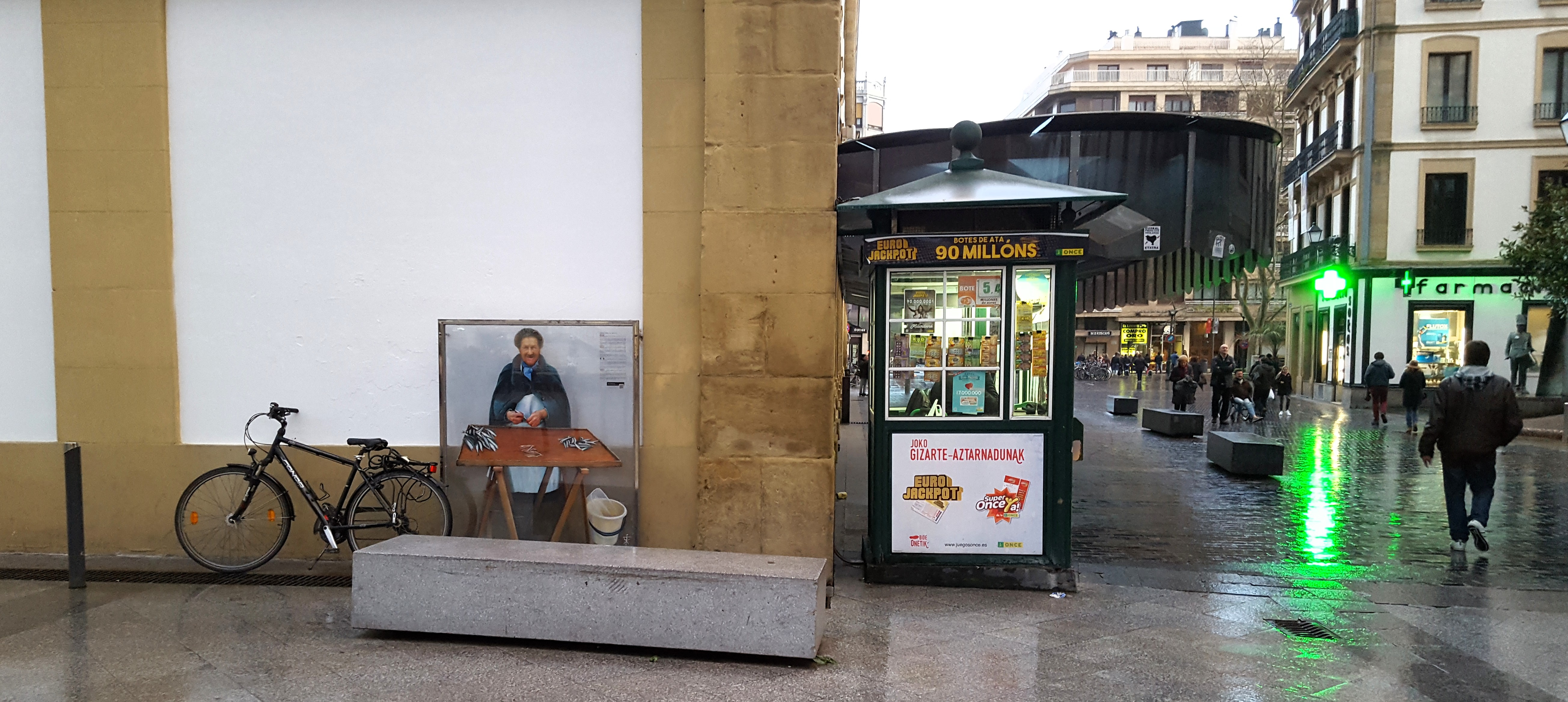 Andresa Portugal arrain-saltzailea. Kaleko omenaldia